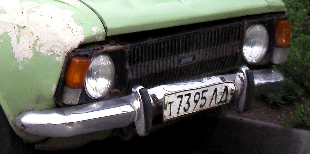 решетка радиатора М-408Э